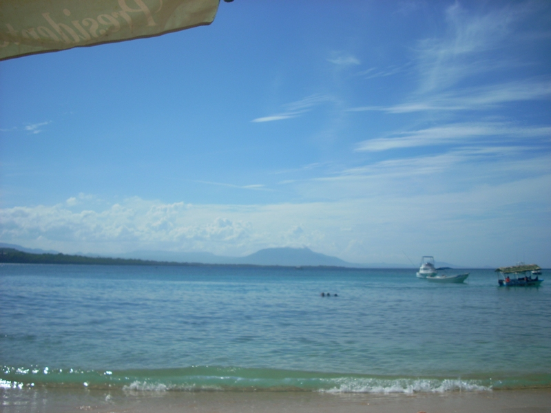 Vista de playa de Sosua desde la costa.